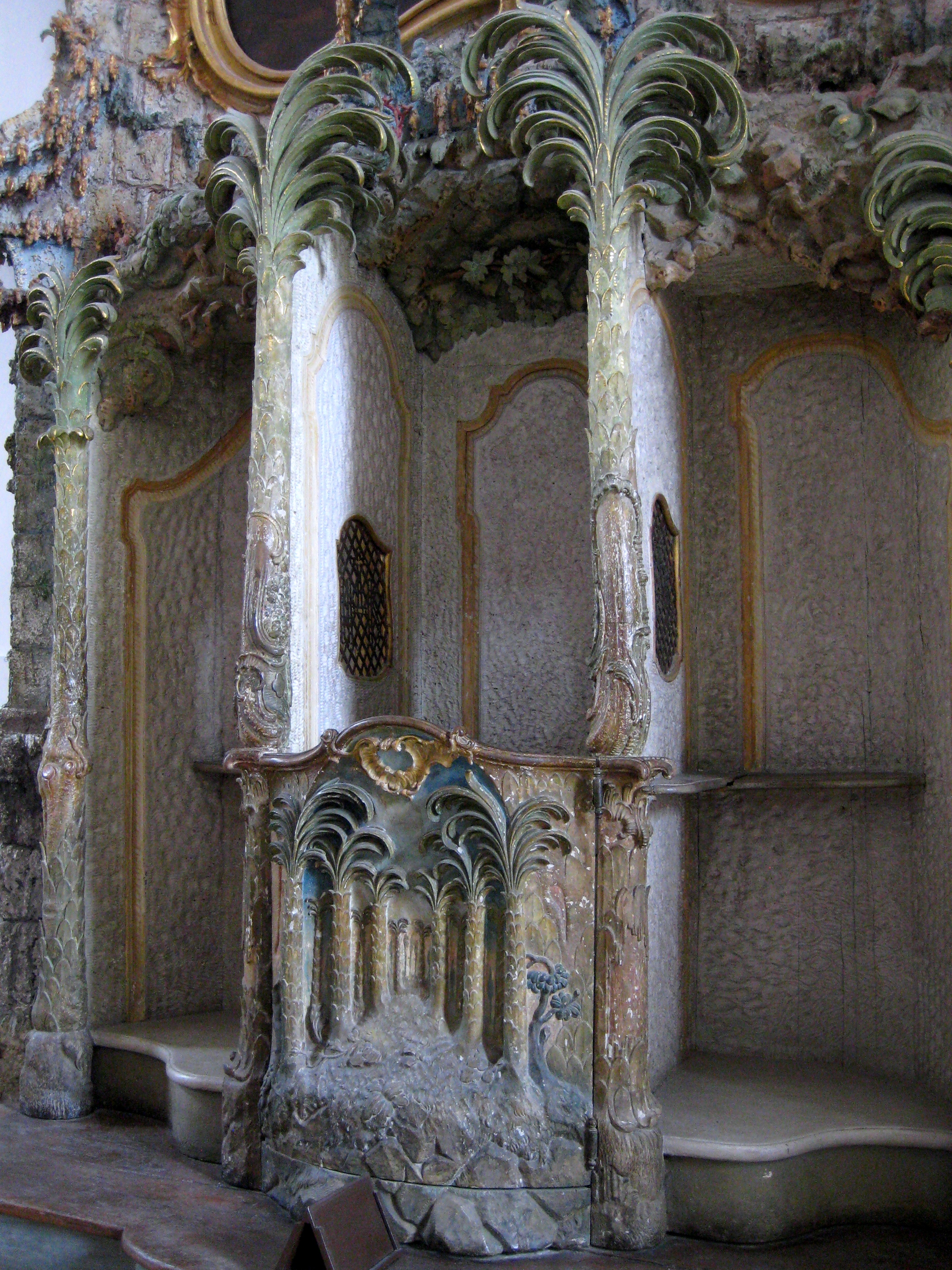 Beichtstul in Form einer Grotte